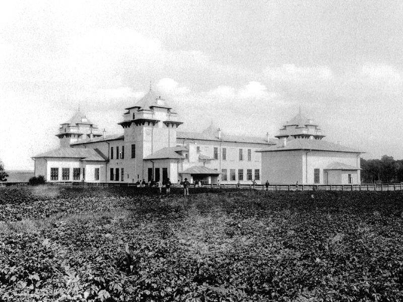 Şcoala Normală din Iaşi